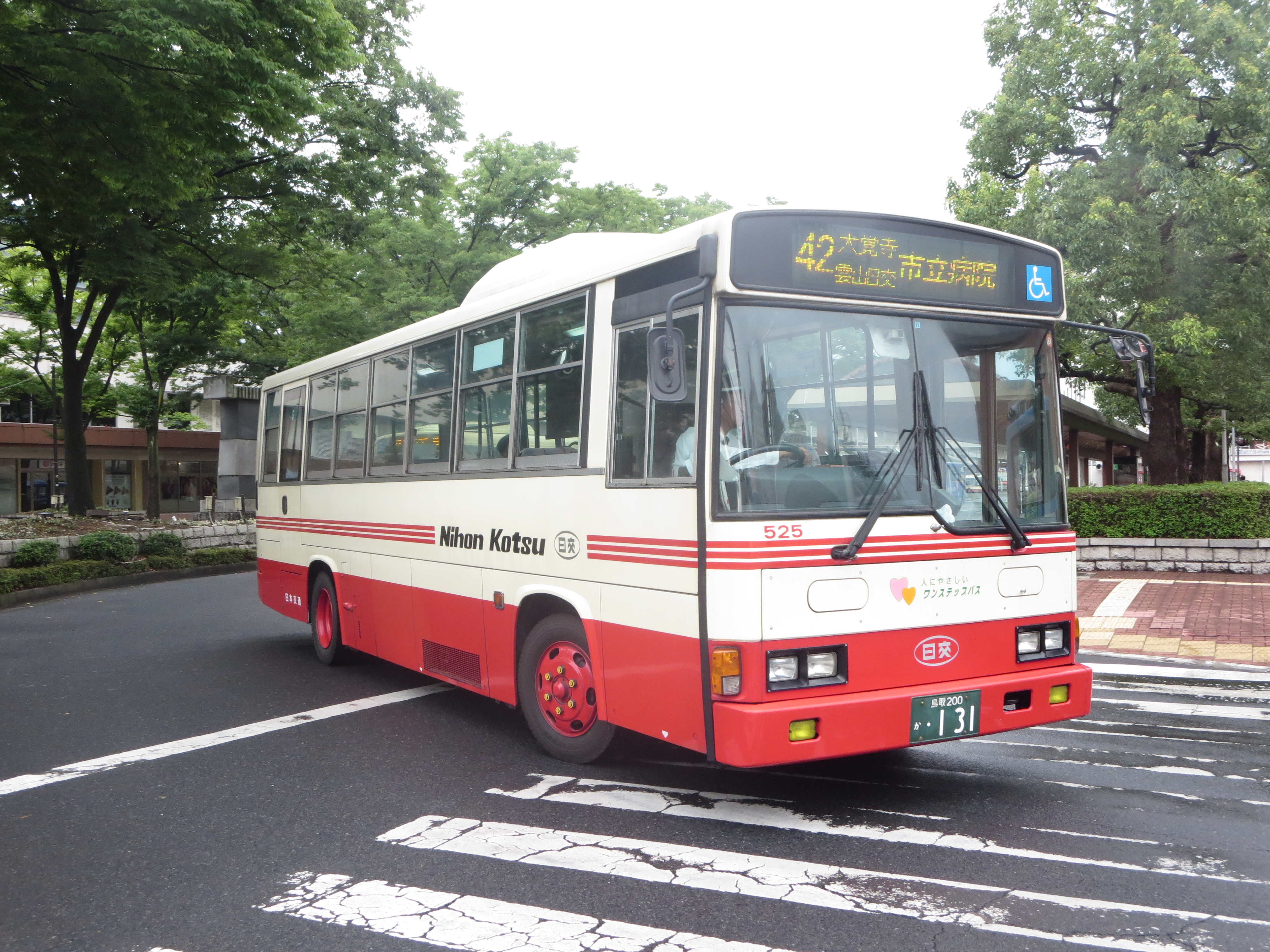 鳥取市内を結ぶ路線バス。JR鳥取駅北側バスターミナル付近公道上より撮影。